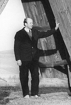 Original image description from the Deutsche Fotothek Leutersdorf-Hetzwalde. Hetzemühle mit Günter Rapp